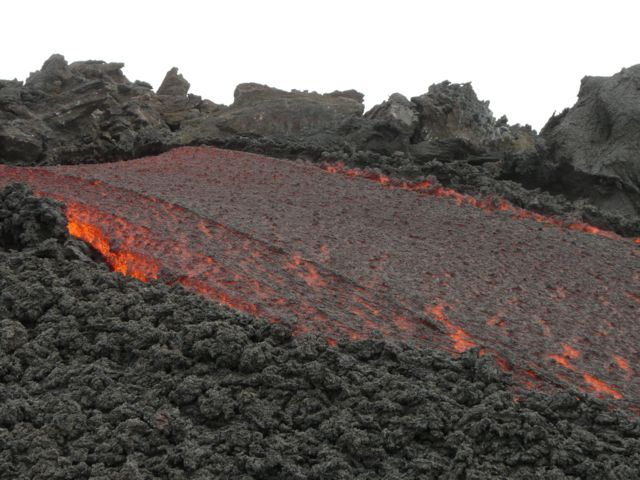 Vue du Guatemala.